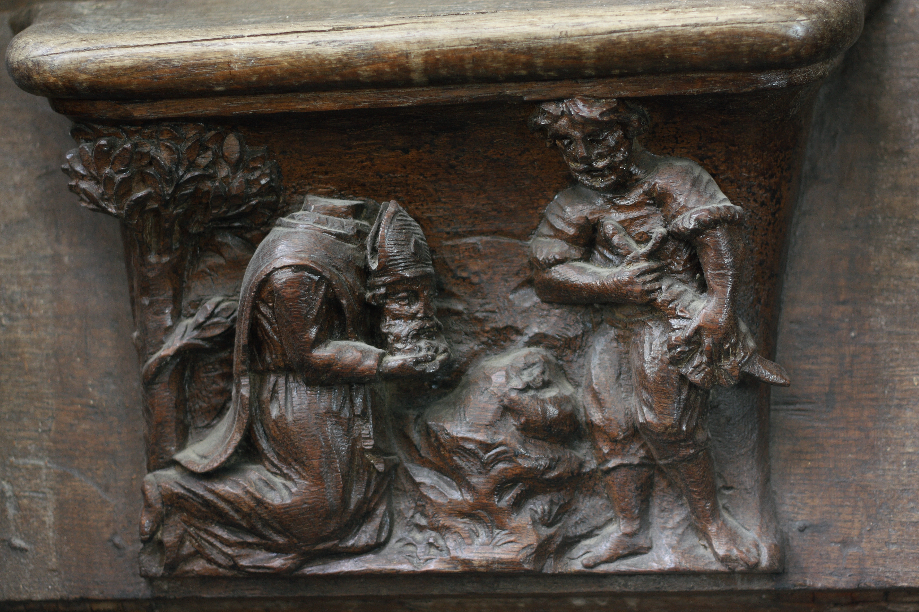 Chorgestühl (Miserikordie) in der katholischen Kirche Saint-Sulpice-de-Favières in Saint-Sulpice-de-Favières im Département Essonne (Île-de-France), aus dem 15./16. Jahrhundert, vermutlich aus der Abtei Morigny; Darstellung: Martyrium des hl. Dionysius